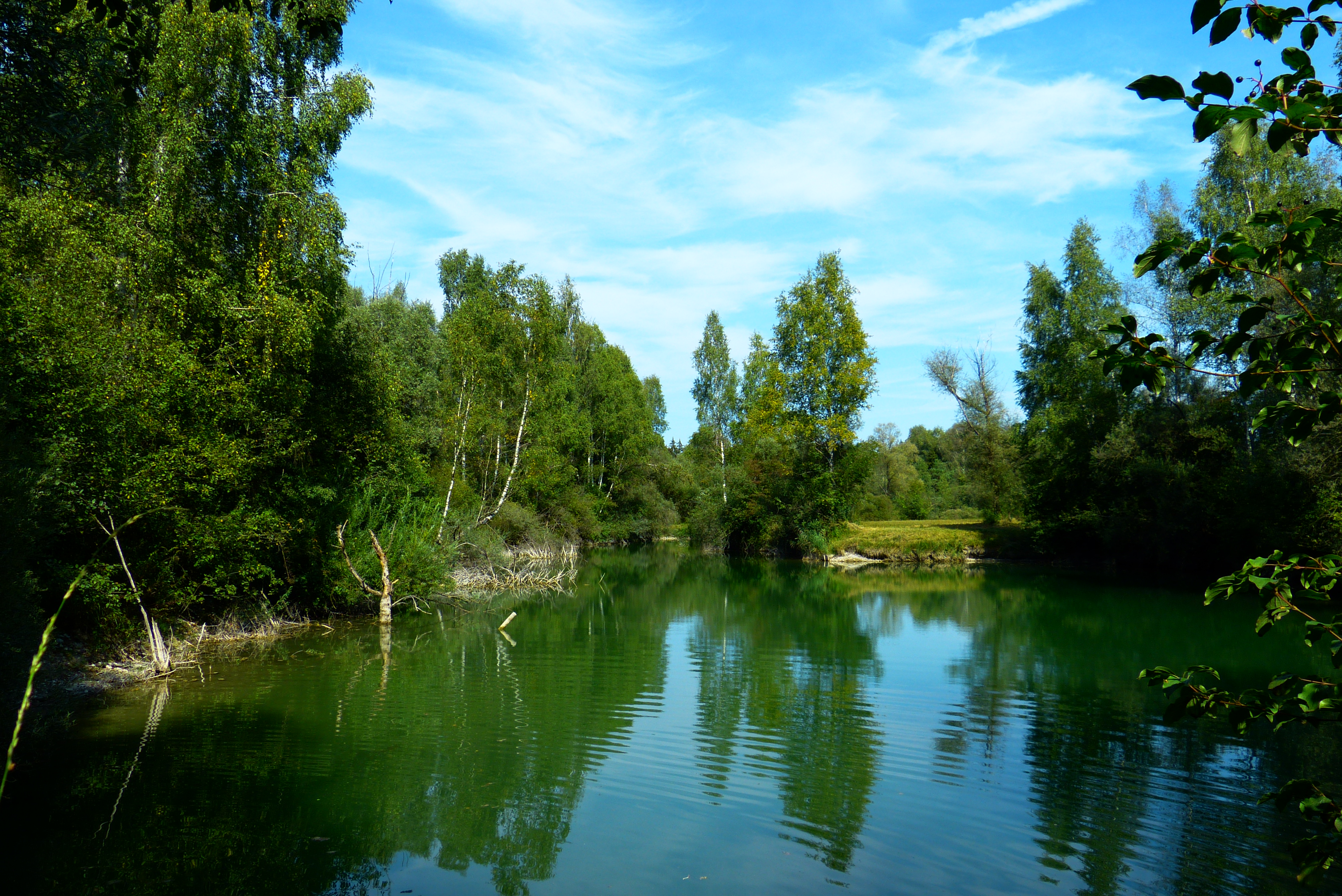 Naturschutzgebiet Lechaue westlich Todtenweis, Landkreis Augsburg: Weiher.